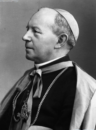 Biskup Adolf Piotr Szelążek